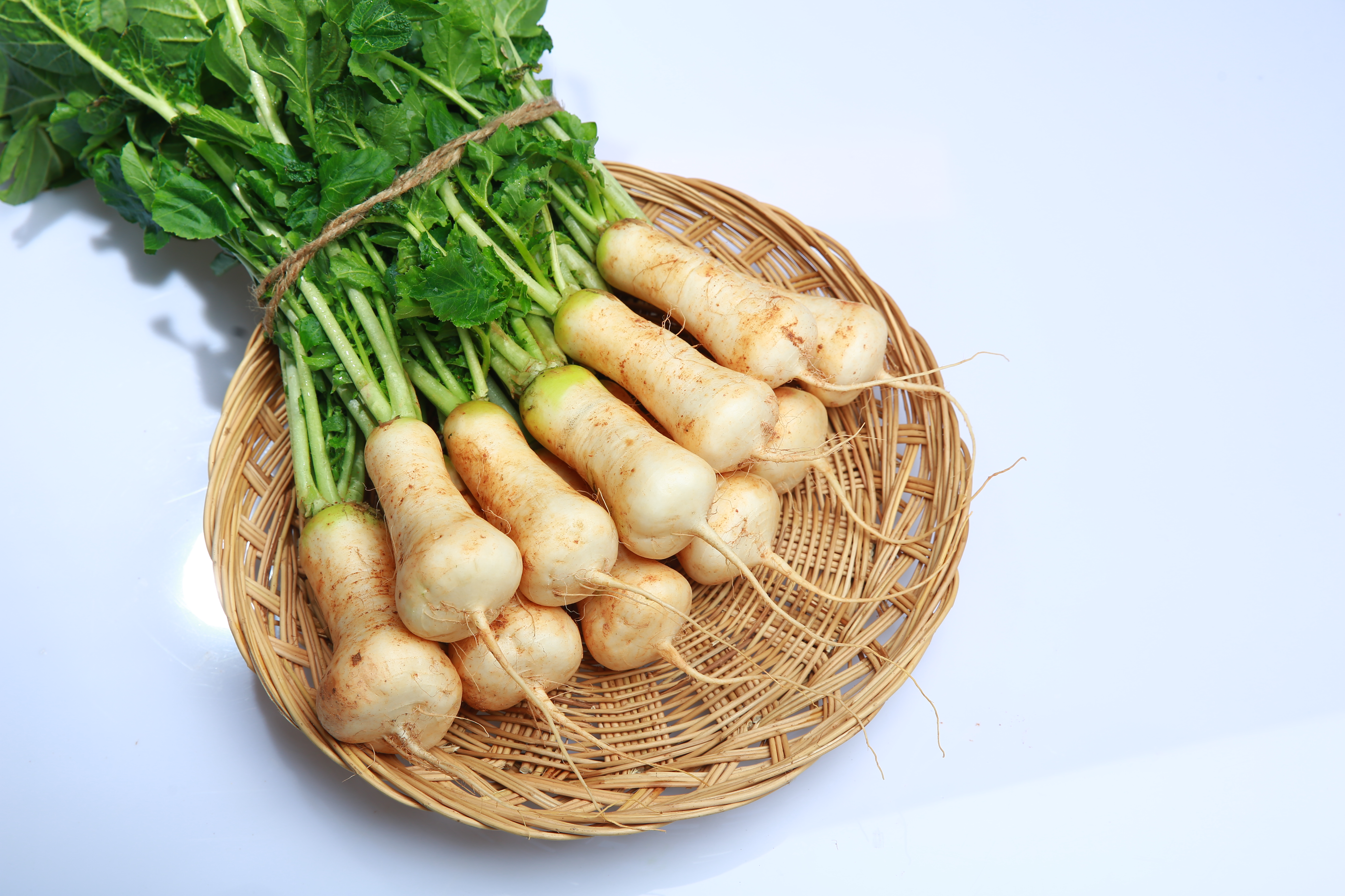 조선말: 서산의 알타리무